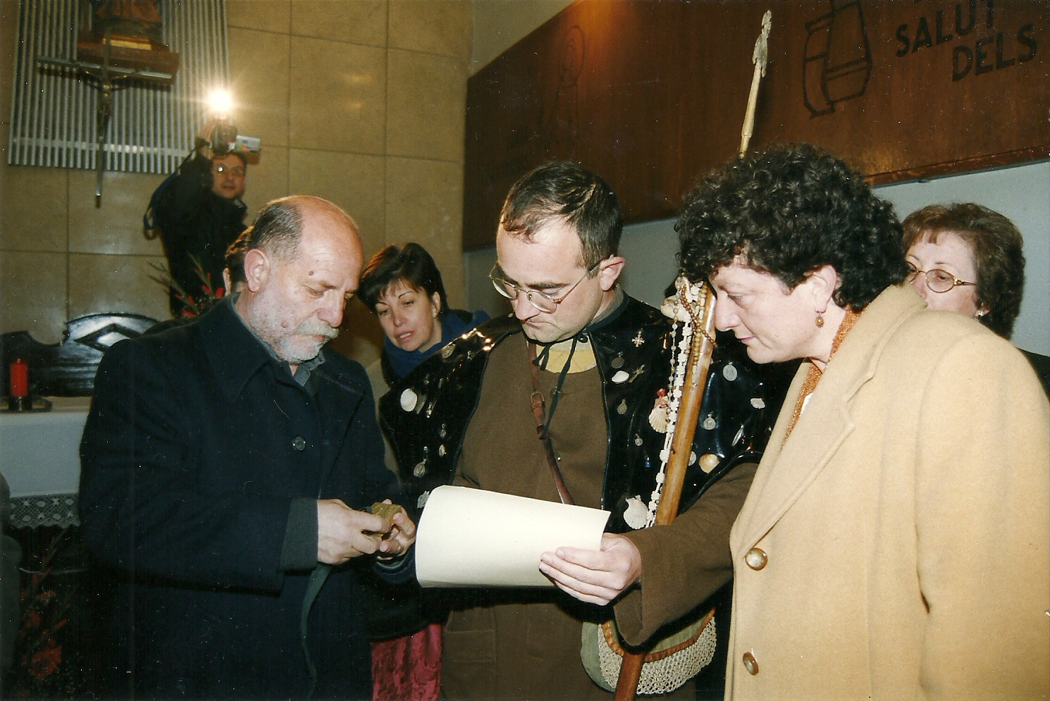 El Pare Pelegrí, amb les autoritats abans de marxar cap a Santa Coloma (any 2000)